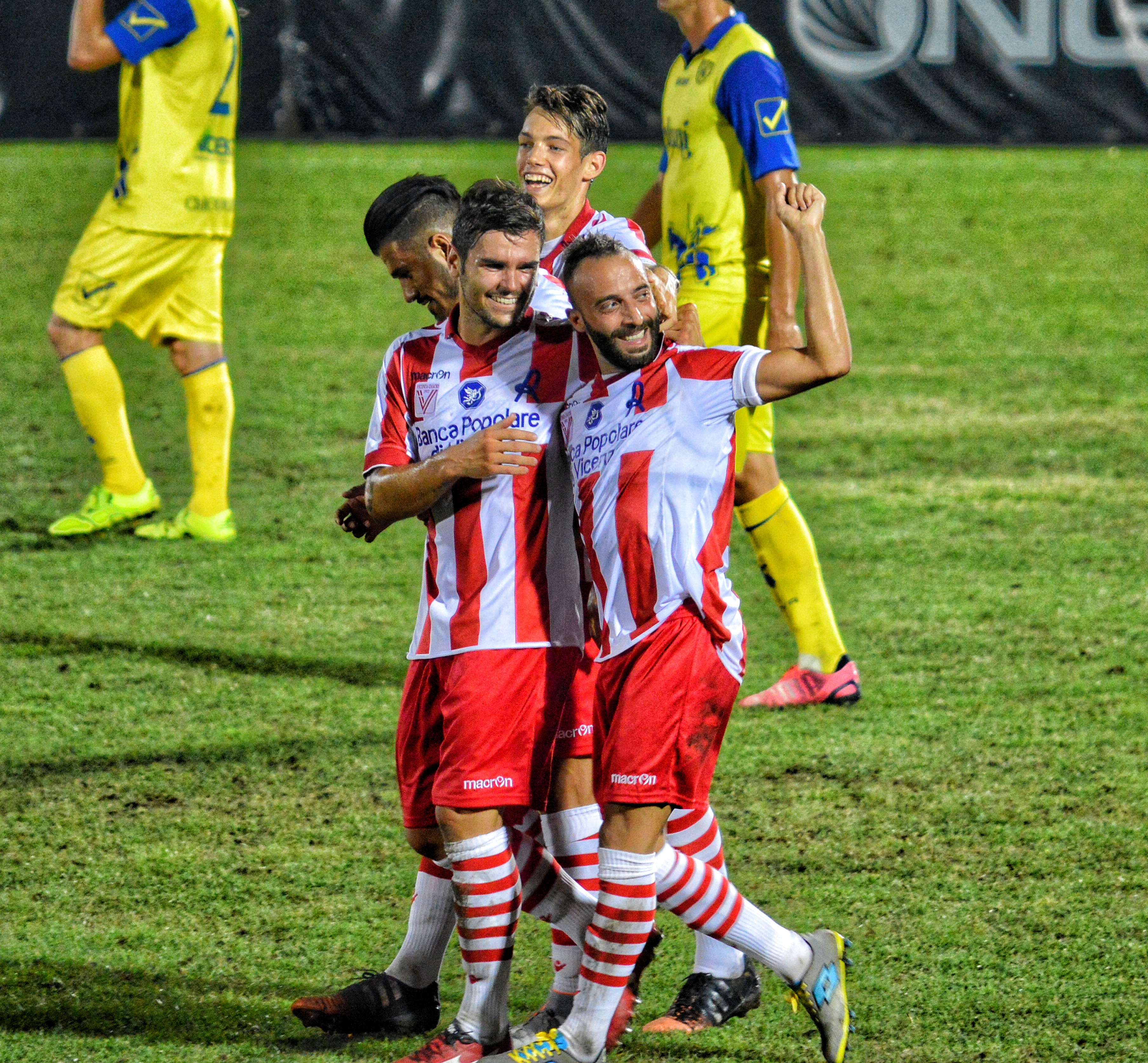 Giacomelli esulta alla sinistra di Brighenti dopo il secondo gol in Vicenza - Chievo 2-1